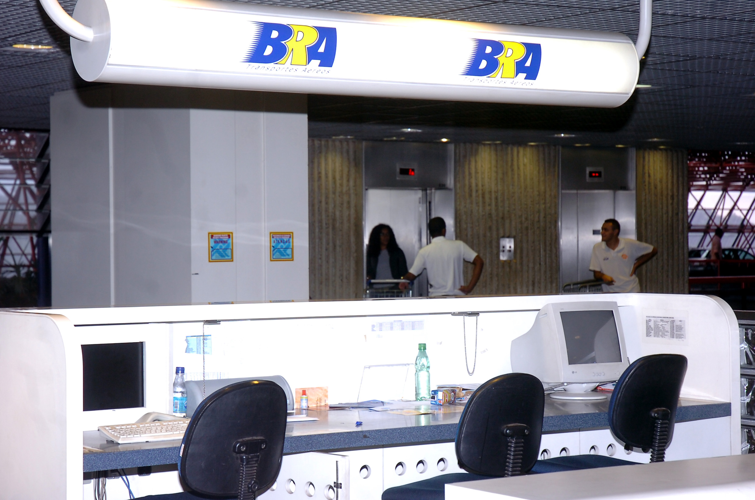 Oficinas de BRA